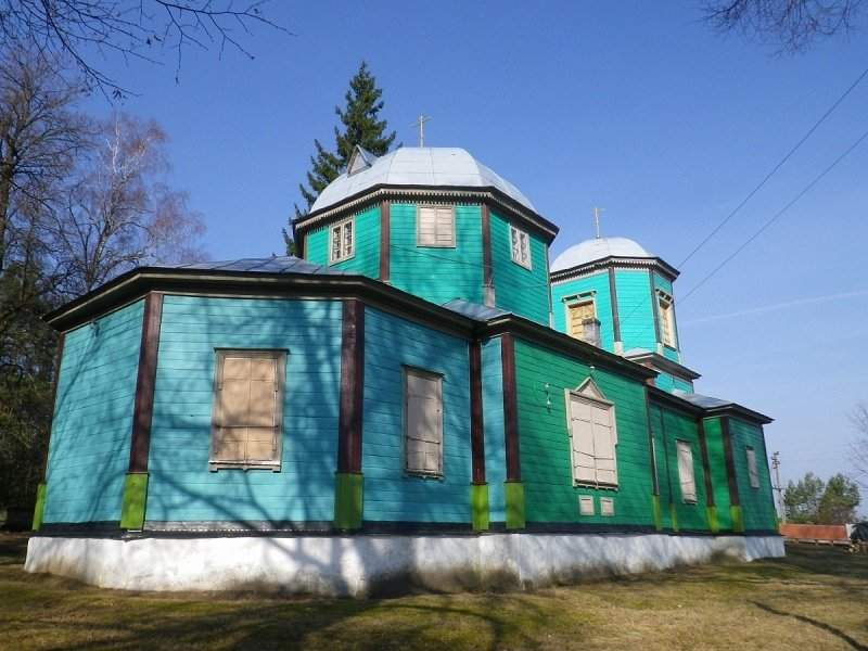 Гарадок (Глускі раён). Царква